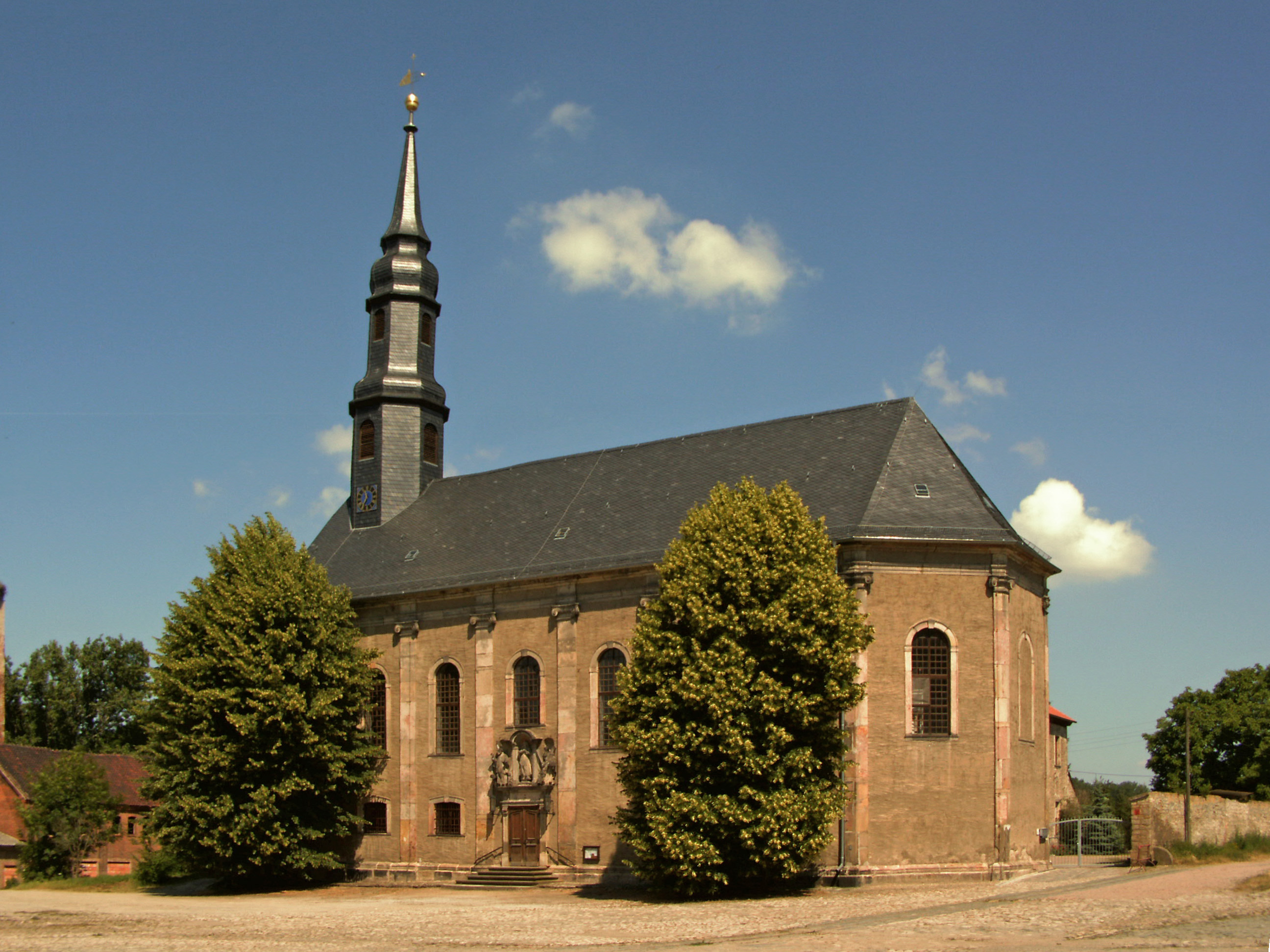 Katholische Kirche St. Nikolaus in Adersleben, Ortsteil von Wegeleben